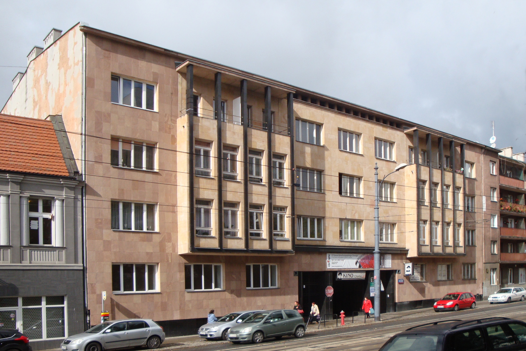 Łódź, kamienica Tomaszowskiej Fabryki Sztucznego Jedwabiu, 1937 ul Piotrkowska 203/205